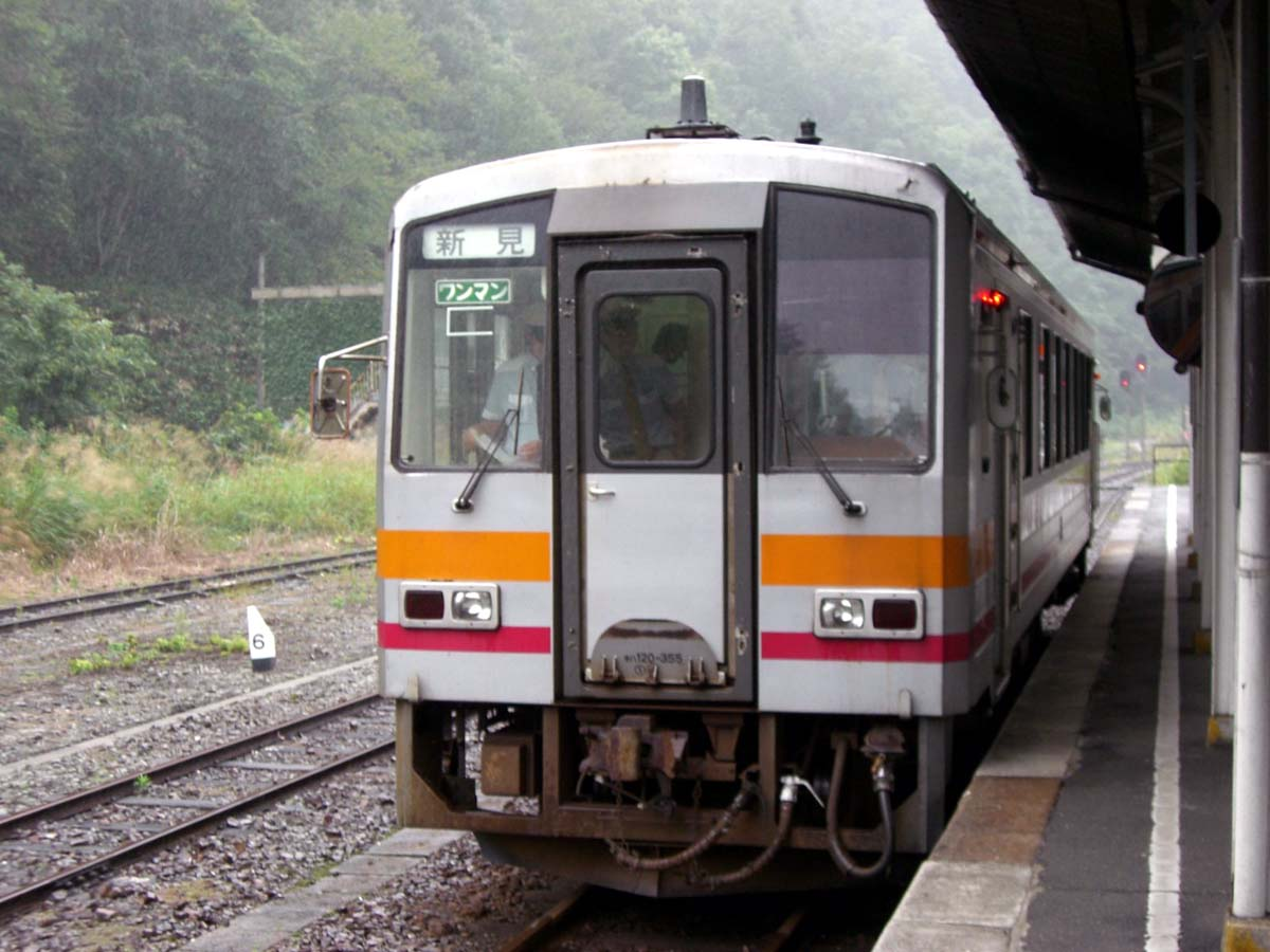 撮影地、撮影場所…JR芸備線、備後落合駅に停車中のキハ120形300番台。撮影年月日…2006年9月17日